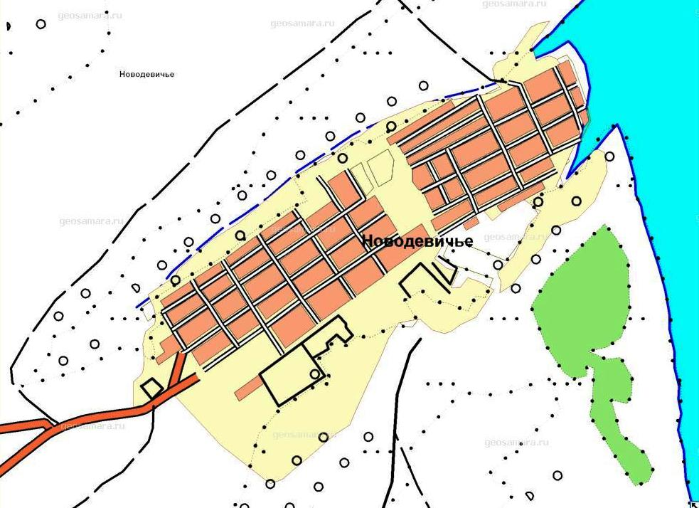 Село Новодевичье Шигонского района Самарской области - Фрагмент карты Самарской области с сайта Геопортала